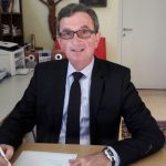 Pfarrer Mag. Franz Handler